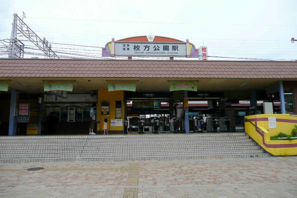 京阪電気鉄道ja:京阪本線ja:枚方公園駅大阪淀屋橋方面のりばの駅舎